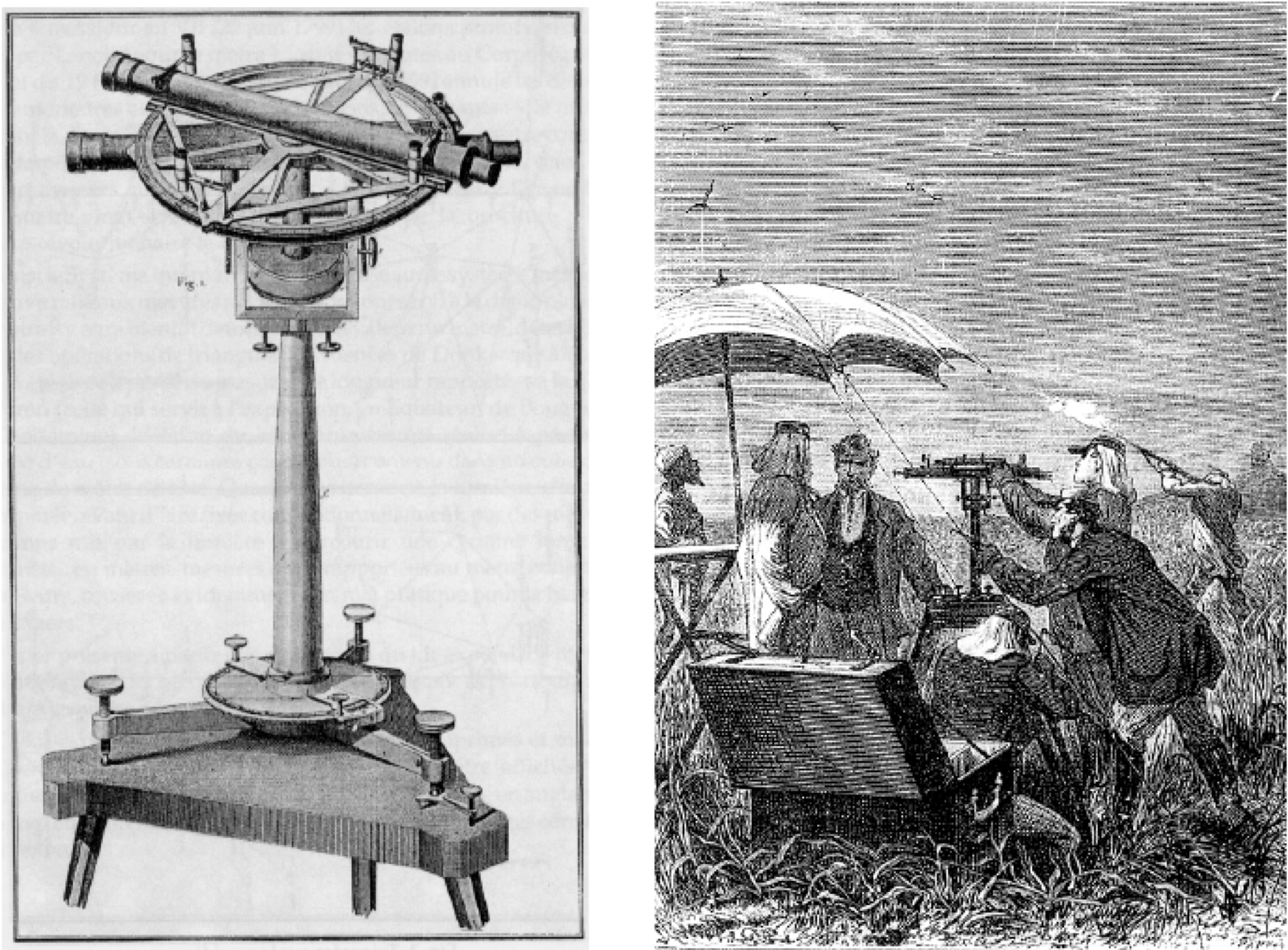 Cette illustration a été composée par l'auteur à partir de deux illustrations scannées dans l'ouvrage de l'abbé J. Loridan Voyages des Astronomes français à la recherche de la figure de la terre et de ses dimensions, publiée chez Desclée, de Brouwer et Cie, Lille 1890. Ces documents sont plus vieux que 70 ans, et l'abbé Loridan a, en toute vraisemblance, lui aussi disparu depuis plus de 70 ans. Par conséquent, on doit considérer que cette illustration se trouve dans le domaine public.